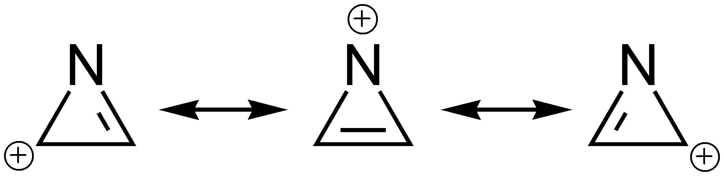 Mesomeriestabilisierung des Aziriniumkations